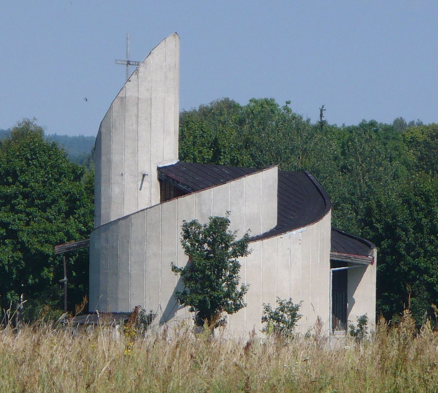 Jedzbark rzymskokatolicka kaplica filialny p.w. św. Antoniego